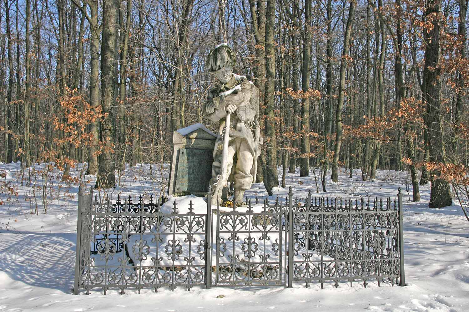 Pomník z války roku 1866